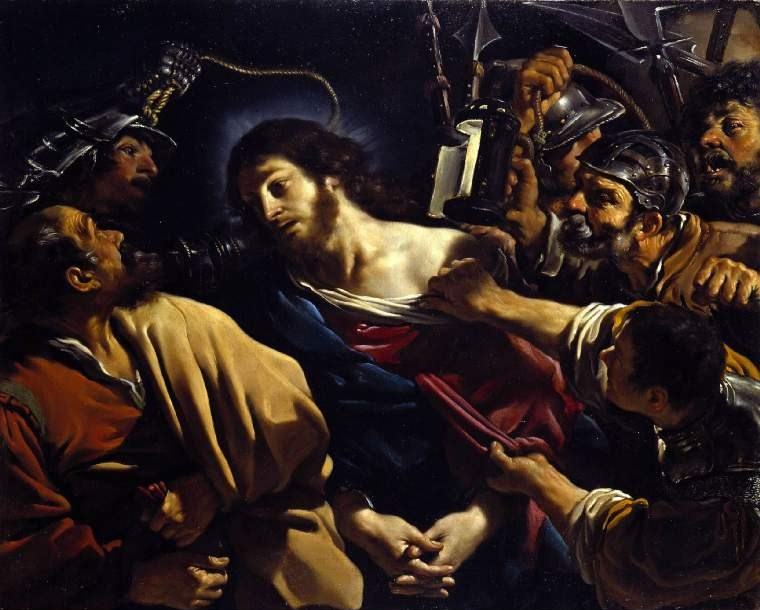 Cattura di Cristo